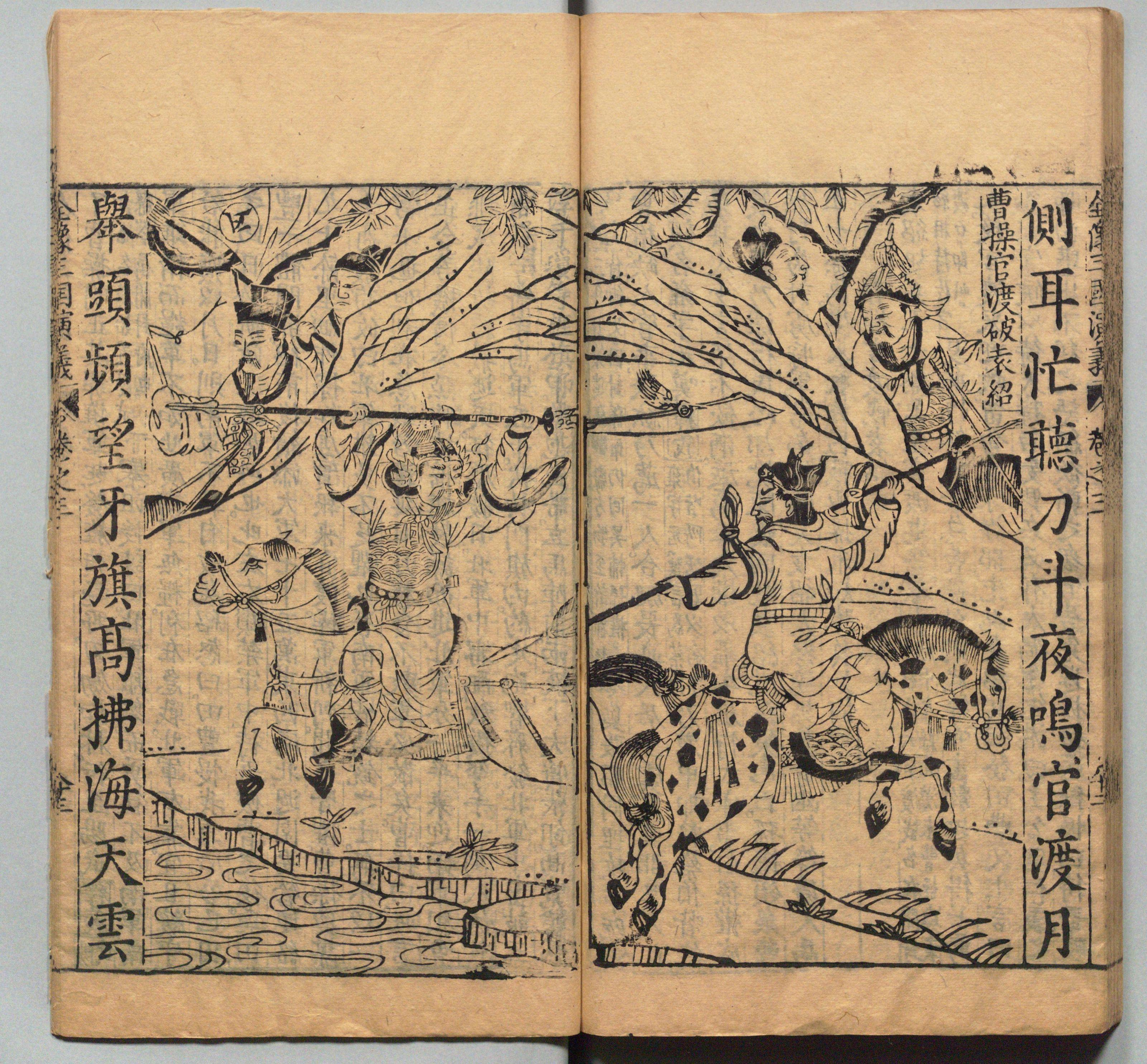 新刊校正古本大字音释三国志通俗演义 明万历十九年书林周曰校刊本